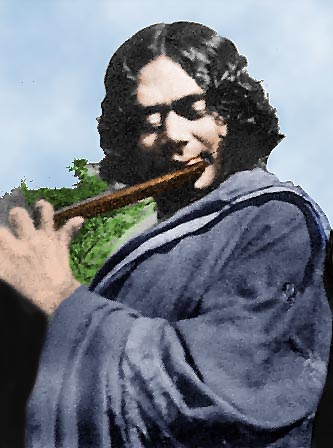 এই চিত্রটি সাদা কালো থেকে রঙিন করা